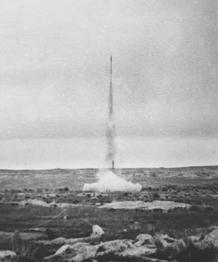 El 2 de febrero de 1961, se realiza el primer lanzamiento de un cohete en América del Sur, se trata del APEX-A1-02 Alfa Centauro, de una sola etapa y propulsante sólido del tipo doble base (nitroglicerina y nitrocelulosa) para investigaciones meteorológicas. Tiene 2,7 m de largo y 28 kg de peso. Se dispara desde la Base Santo Tomé, Pampa de Achala, provincia de Córdoba. Alcanza 20 kilómetros de altura. El Instituto de Investigaciones Aeronáuticas y espaciales (ex Instituto Aerotécnico) dependiente de la Dirección Nacional de Fabricación e Investigación Aeronáutica (DINFIA), dirigido por el comodoro Aldo Zeoli, tuvo a su cargo la construcción y la ejecución de la experiencia.